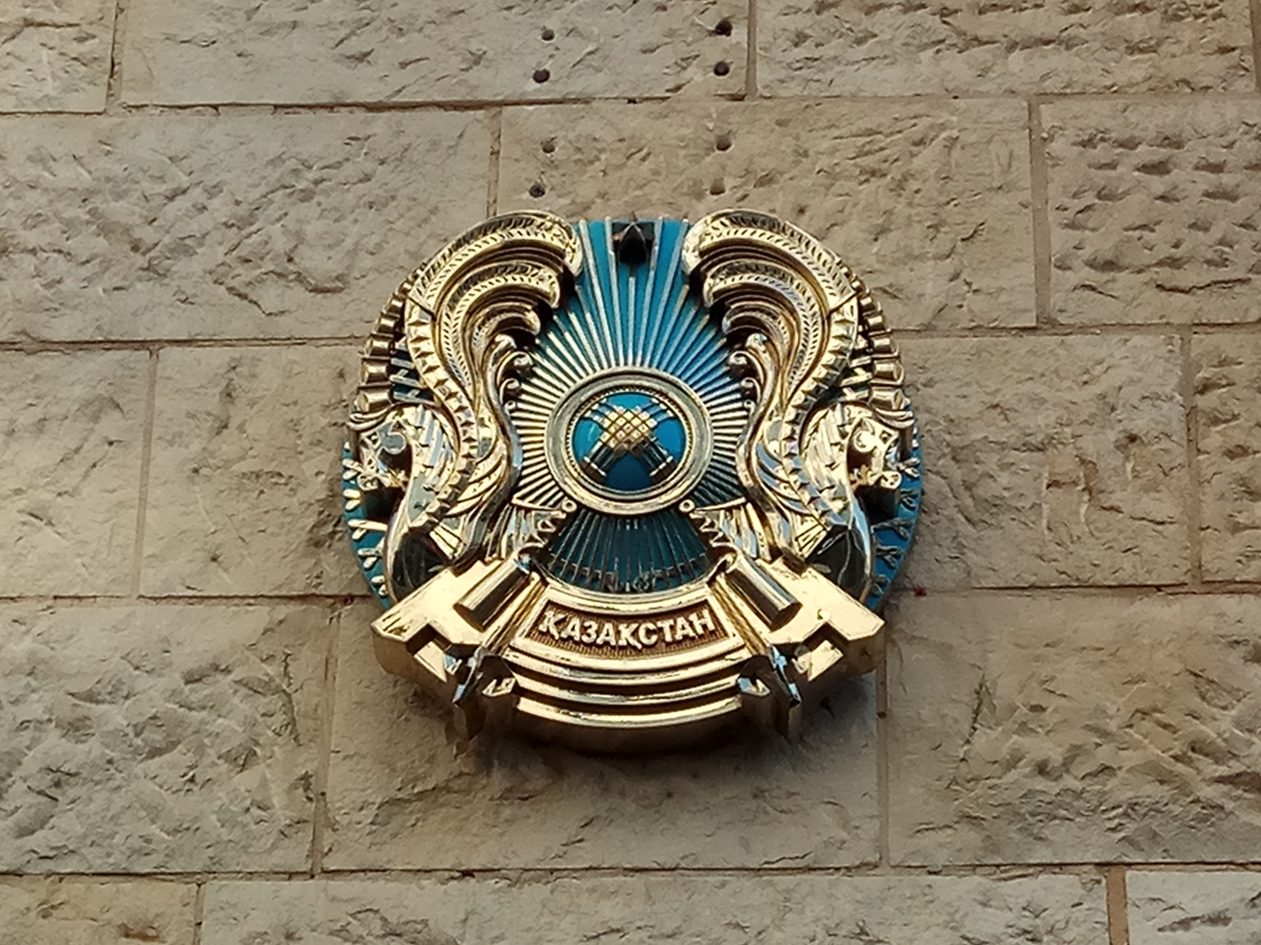 סמל קזחסטן בשגרירות קזחסטן בתל אביב